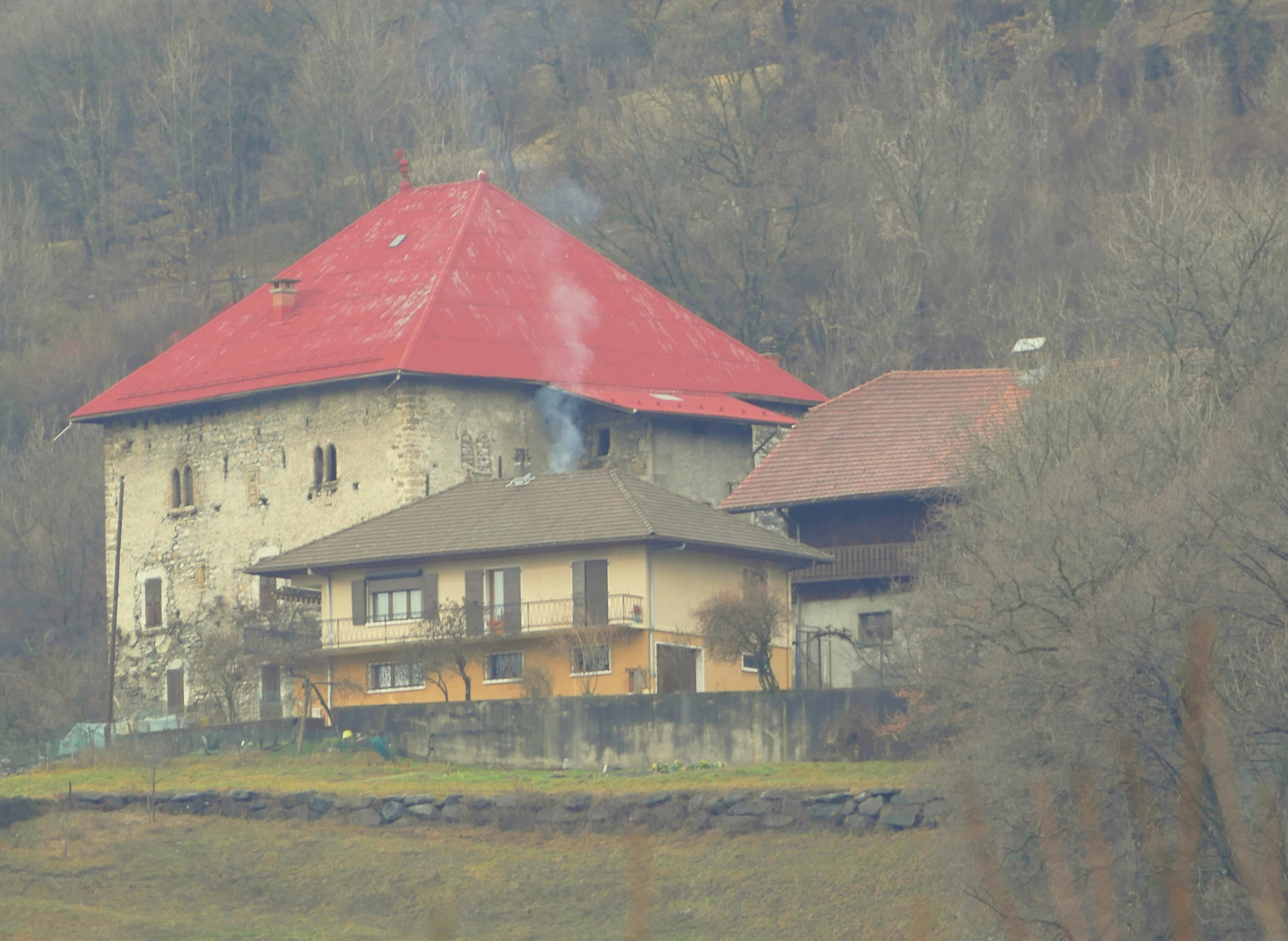 Tour de Dingy, vers 1500, hameau de Chedde, commune de Passy (Haute-Savoie, France).